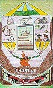 Escudo de Chontla